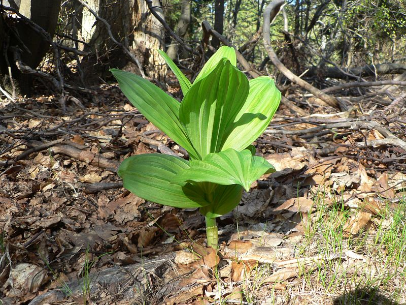 Veratrum album subsp. lobelianum, Orlické hory.